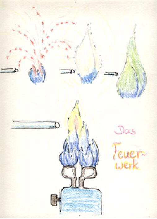 Das Feuerwerk, Lehrstück Faradays Kerze, Susanne Wildhirt